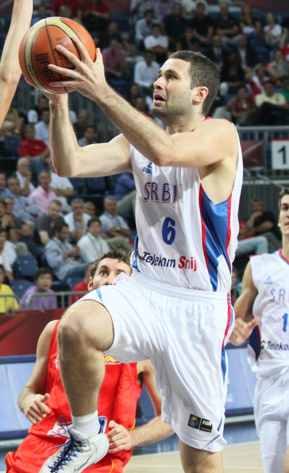 Rašić lays up